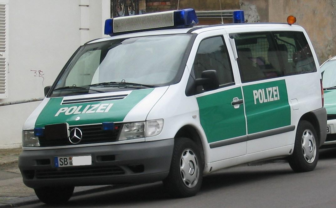 Mercedes Benz Vito Polizei Funkstreifenwagen der Polizei Saarland